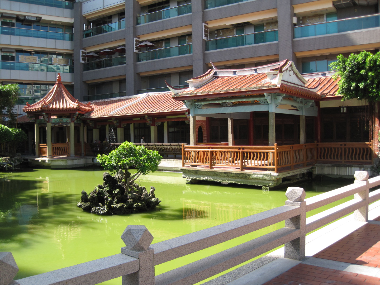 臺南吳園水榭